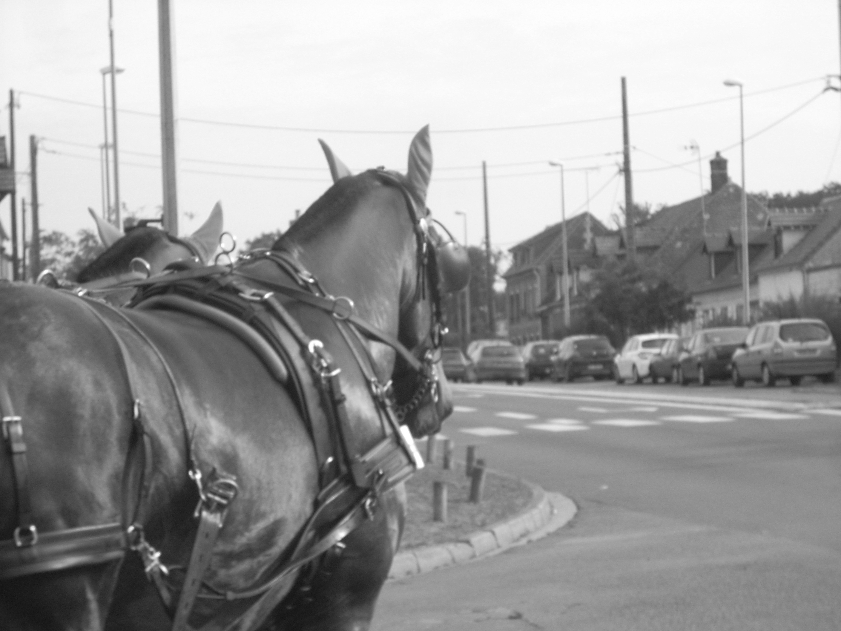 Un équipage de la route du Poisson à La Croix Saint Ouen